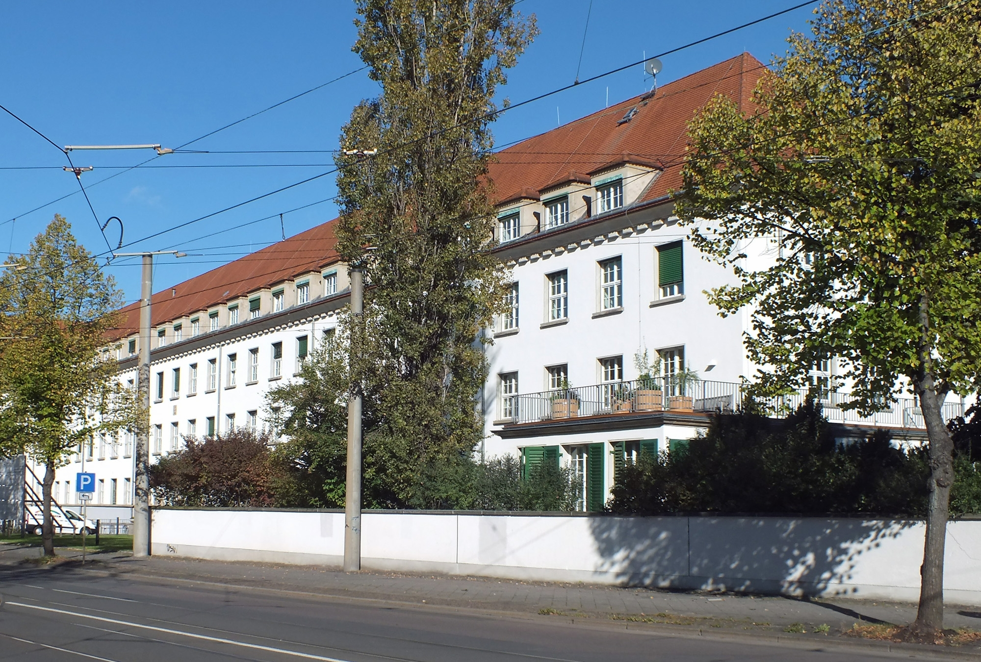 Das Gebäude der Universitätsfrauenklinik Leipzig von 1928 bis 2007 in der Philipp-Rosenthal-Straße